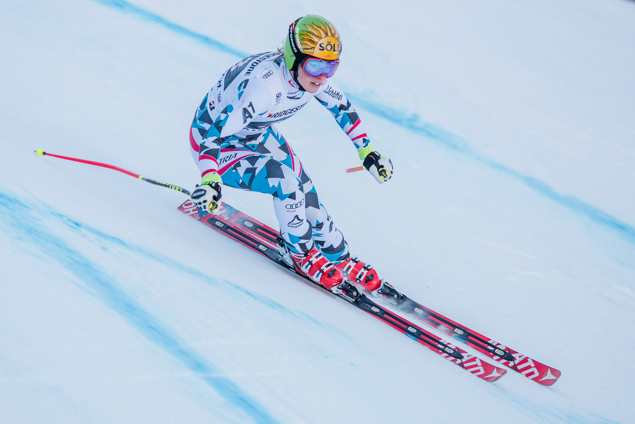 64. Kandahar Rennen,Audi FIS Ski Weltcup Garmisch-Partenkirchen,Christina Ager,Damen Abfahrt,Kandahar,Ladies Downhill